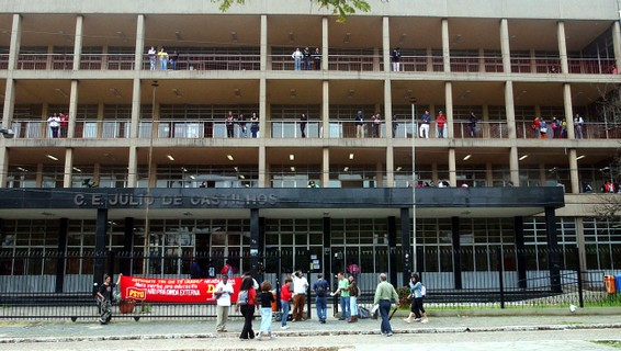 O Colégio Estadual Júlio de Castilhos, em Porto Alegre, durante campanha pela posse do grêmio estudantil.